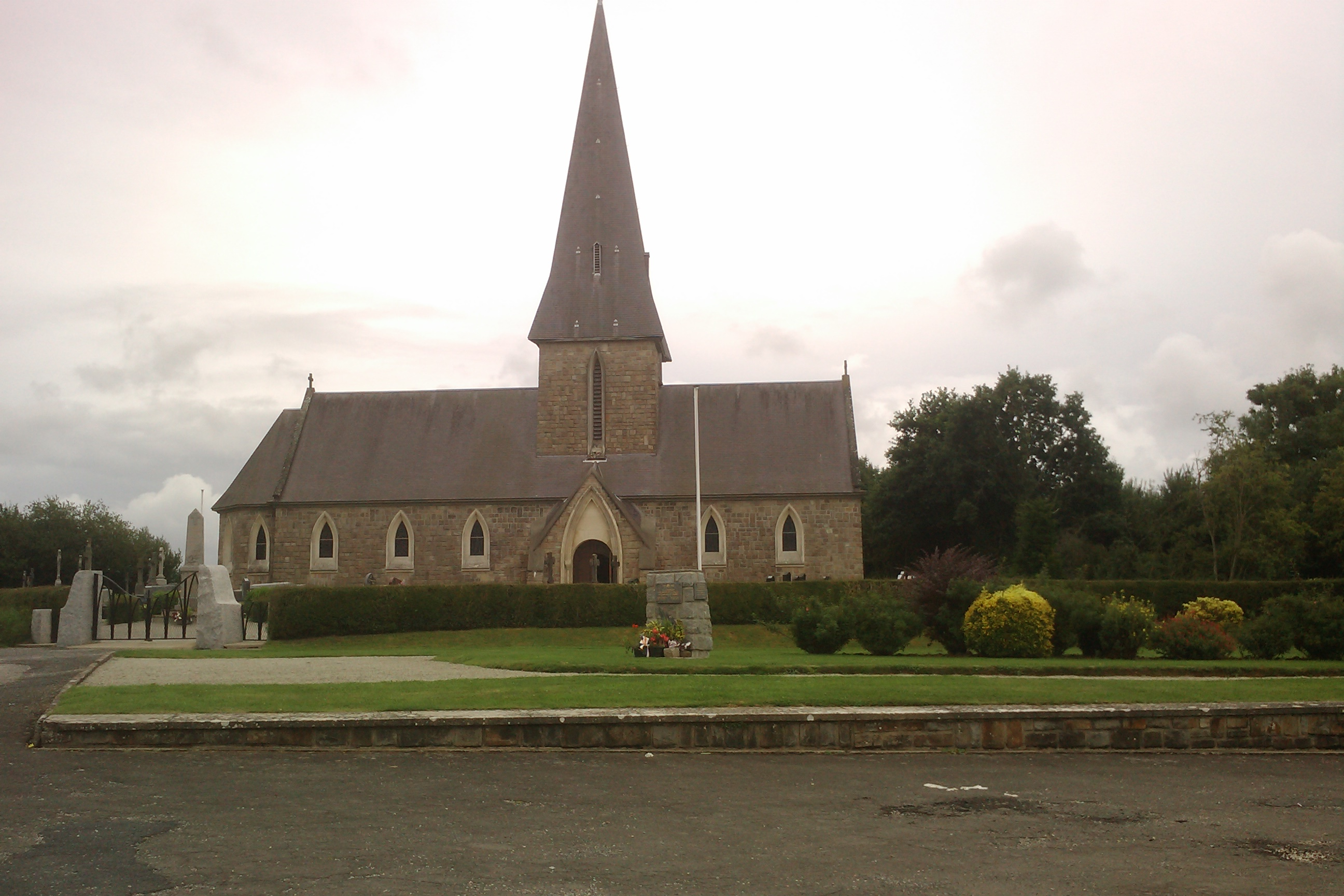 Photo de l'église de Saint-Symphorien-le-Valois